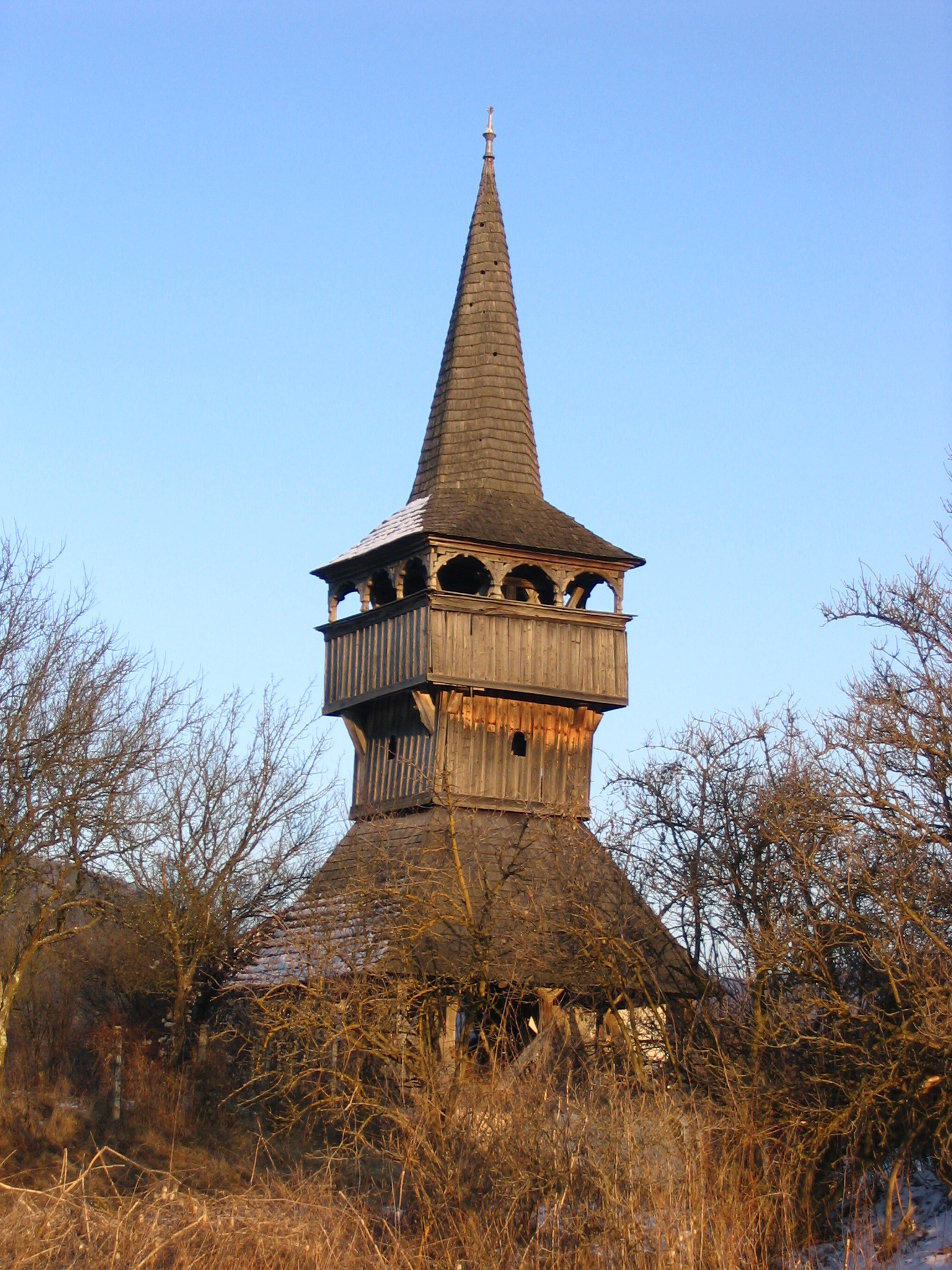 Clopotniţa bisericii reformate din Sfăraş, judeţul Sălaj.